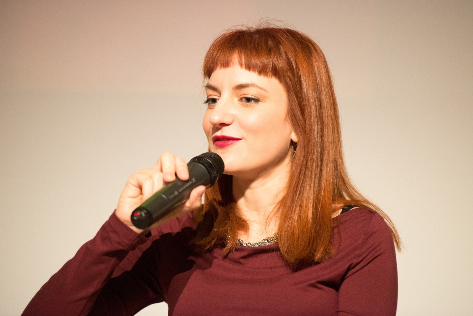 Francesca Manfredi, scrittrice italiana